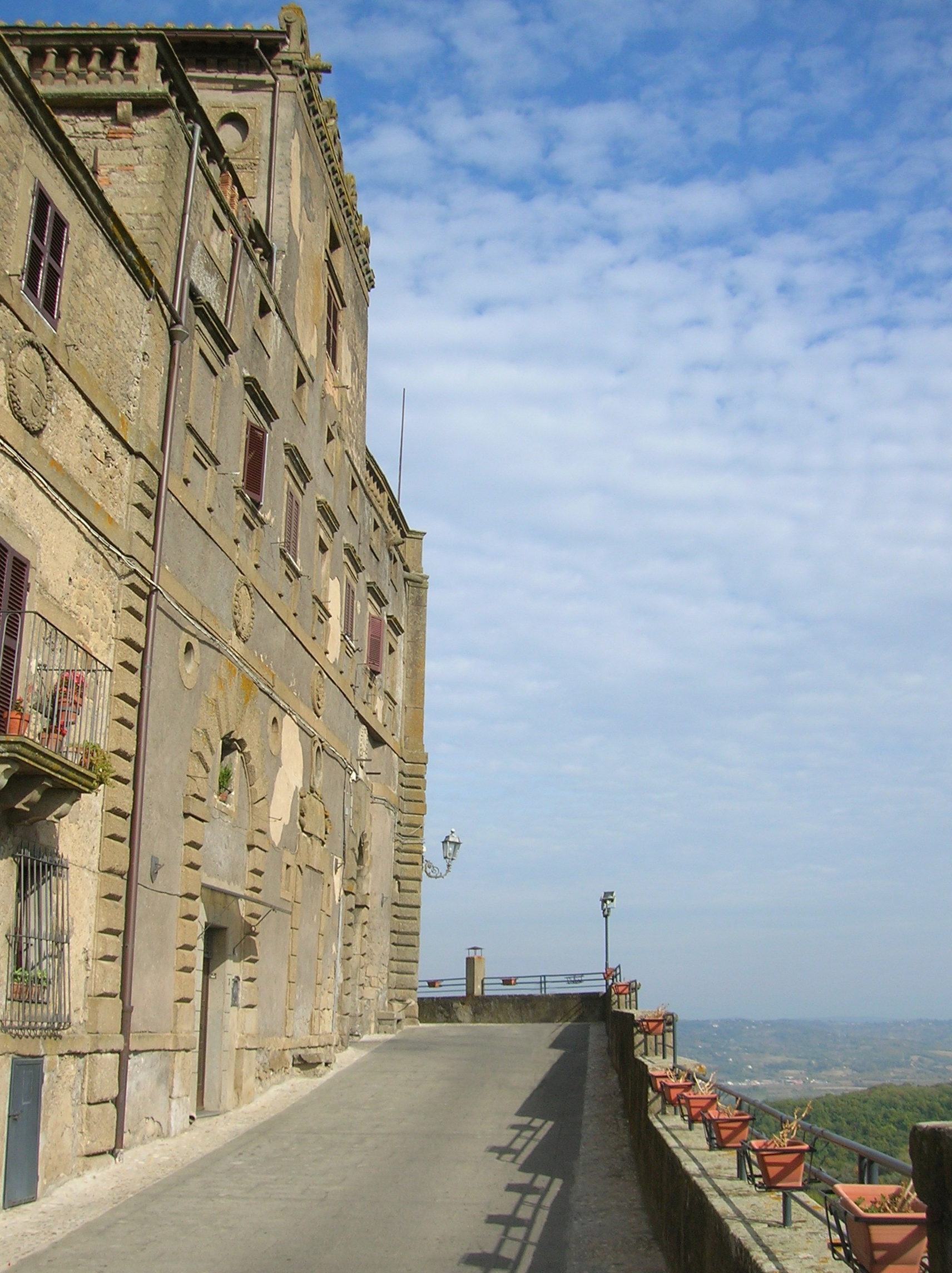 Palazzo Orsini, Bomarzo, Lazio, Italia.